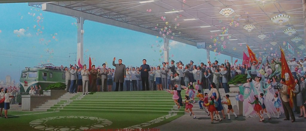 Pyongyand Railway Museum